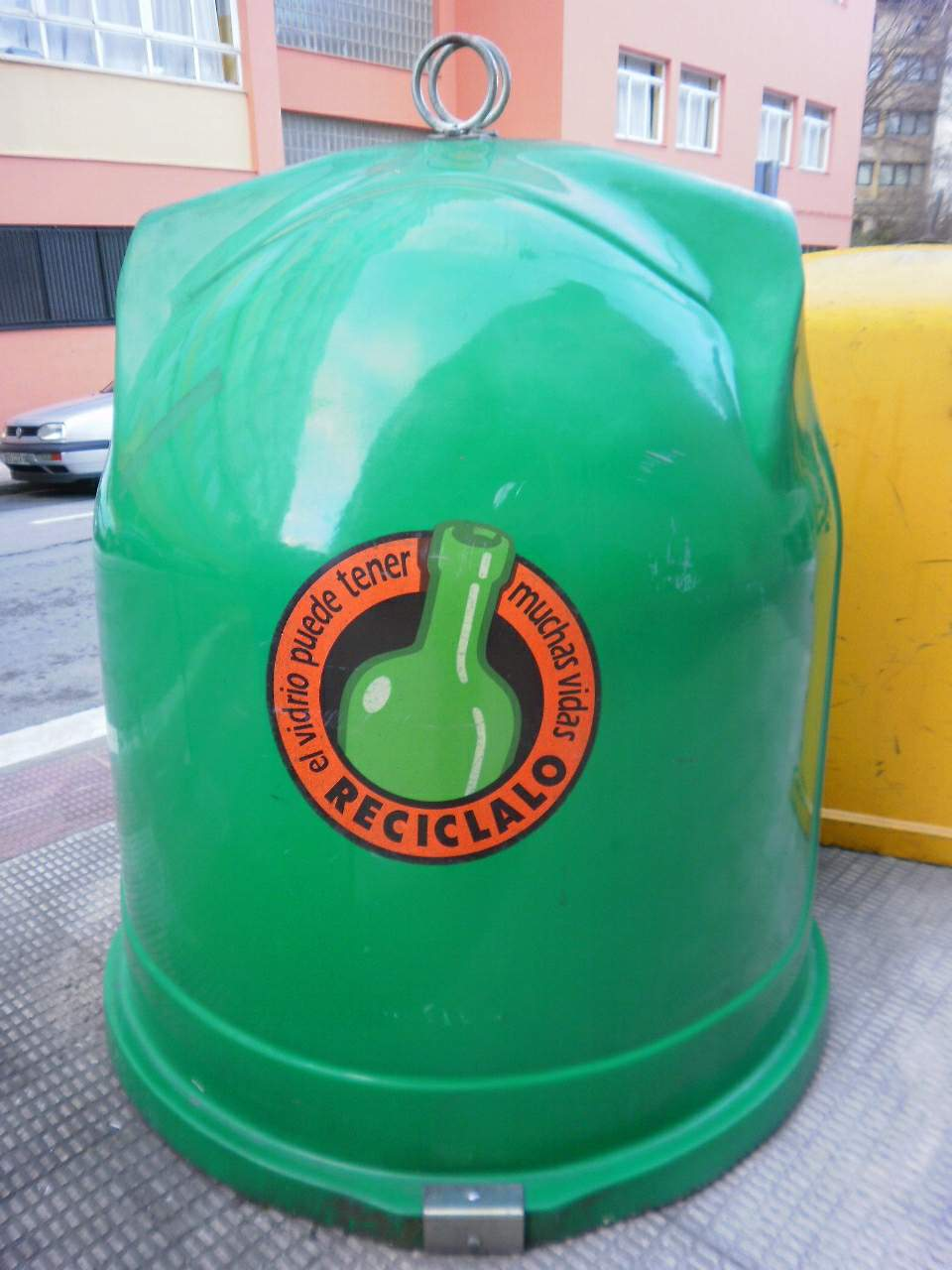 Arrasate (Gipuzkoa)